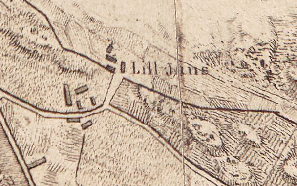 Lill-Jans gård på Akrels karta från 1803